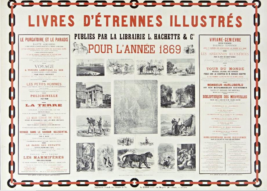 Affiche lithographiée de la Librairie L. Hachette et Cie pour ses livres d'étrennes année 1869. Imprimerie A. Chaix, Paris. Format 90 x 120 cm.